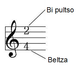 Konpasa